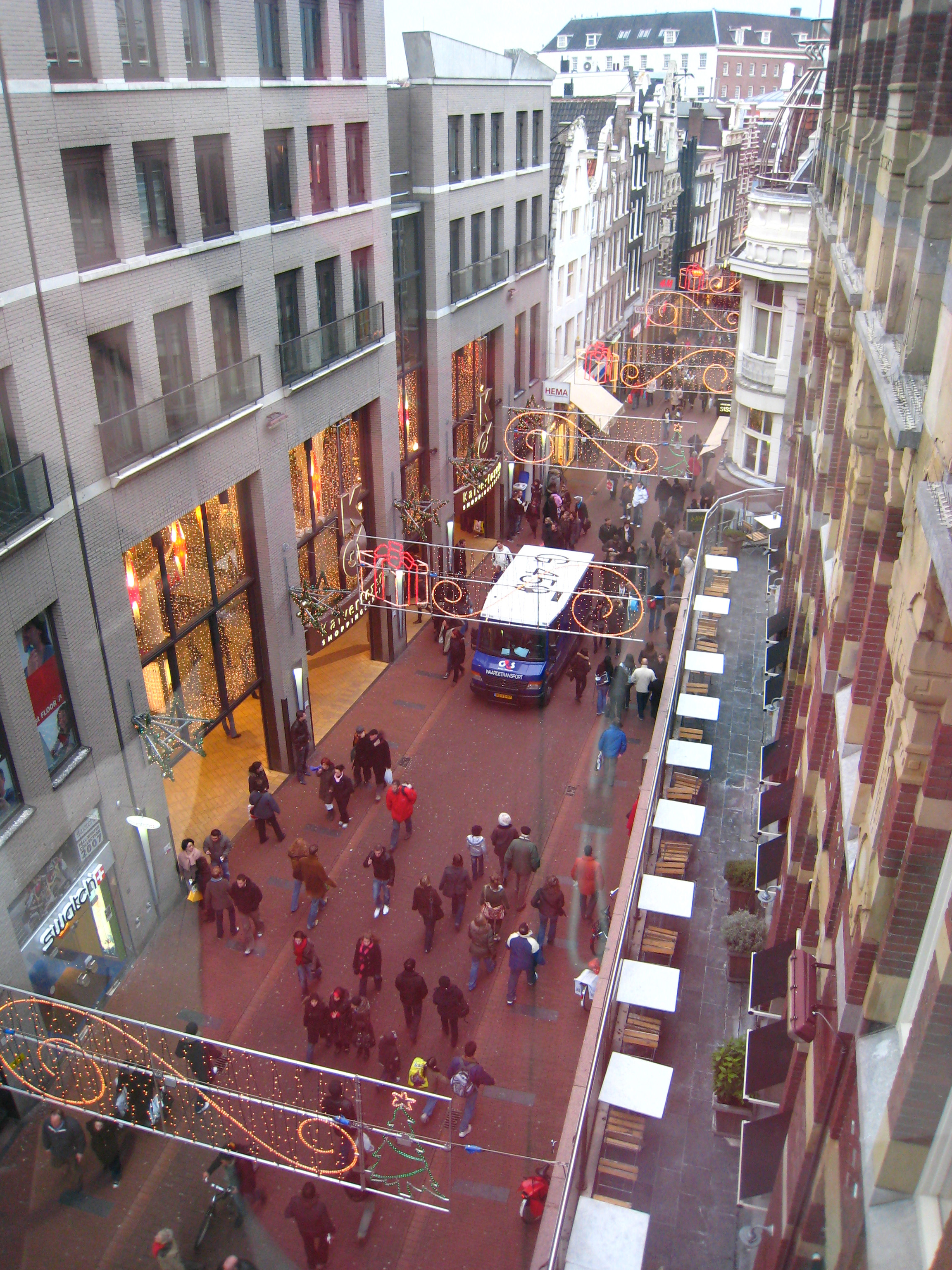 Kalverstraat in Amsterdam (met kerstversiering).